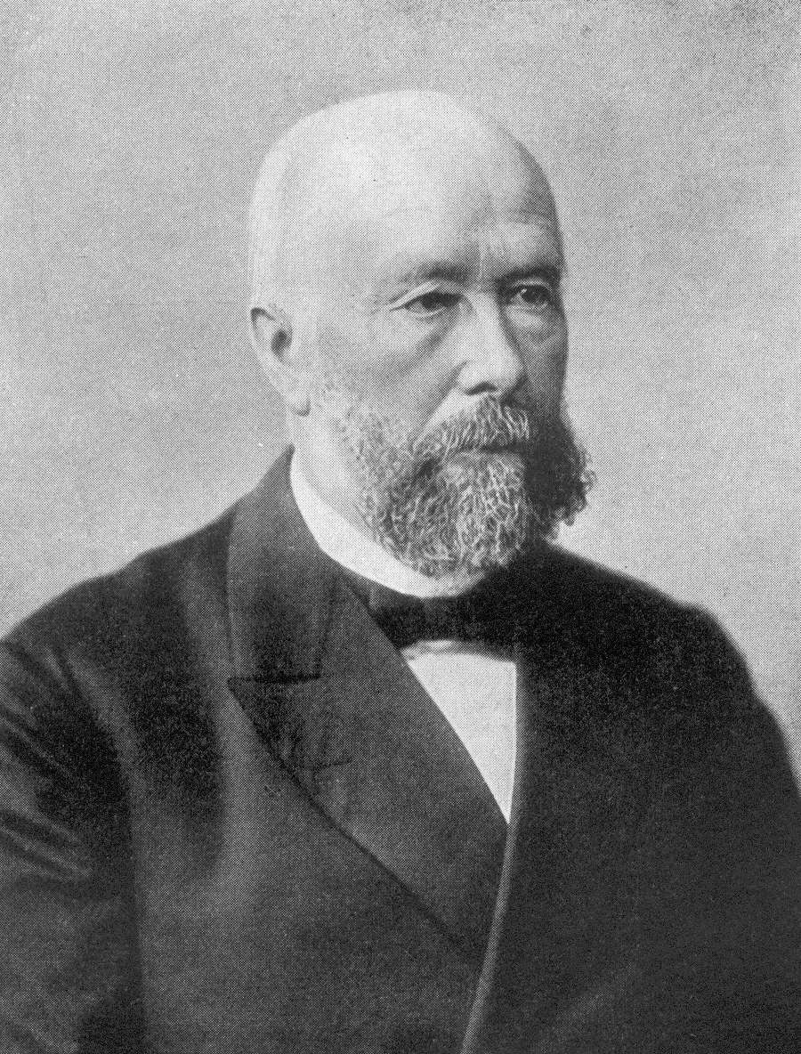 Fotografie Rudolf v. Bennigsens